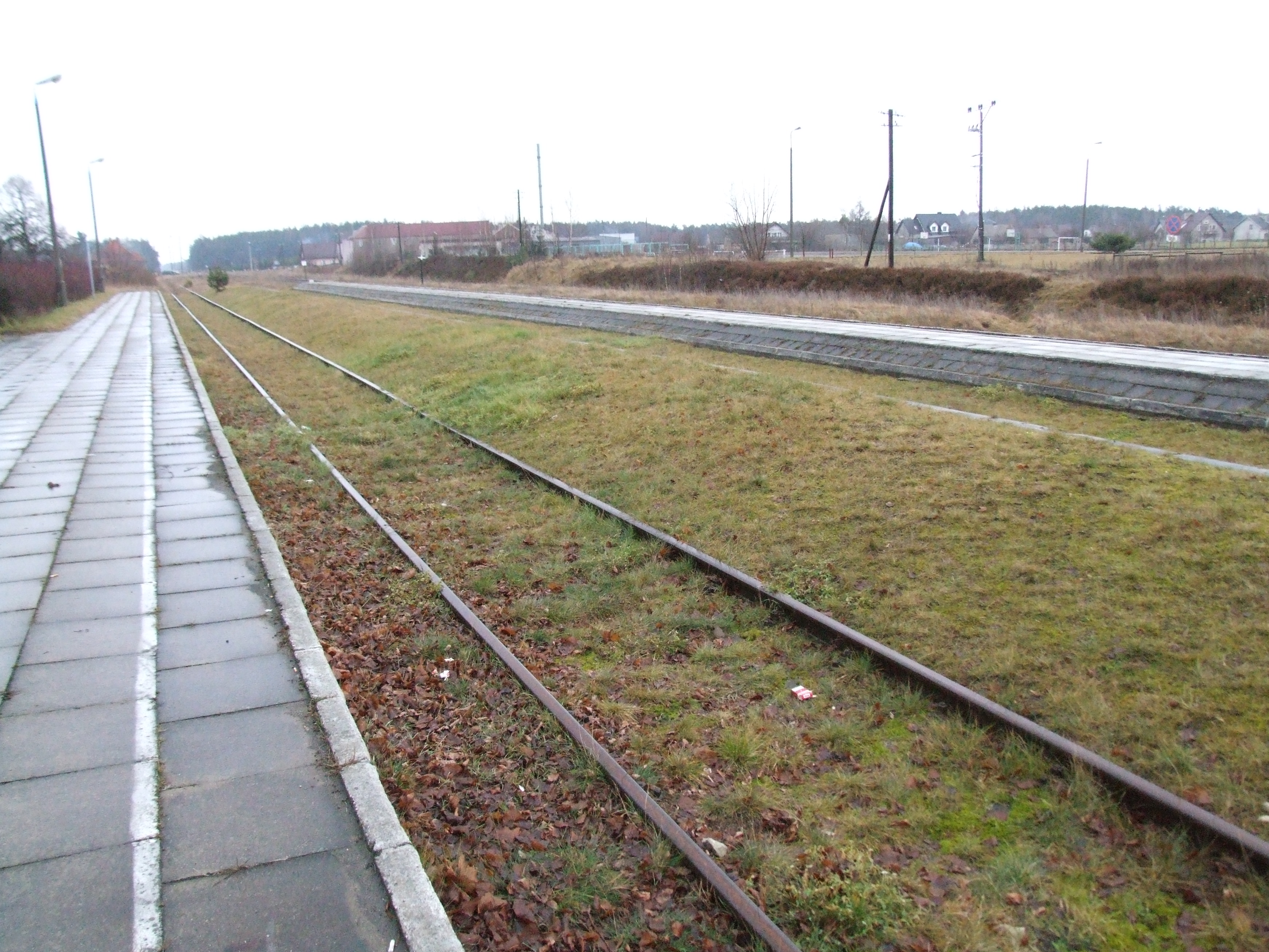 Karsin (stacja kolejowa)